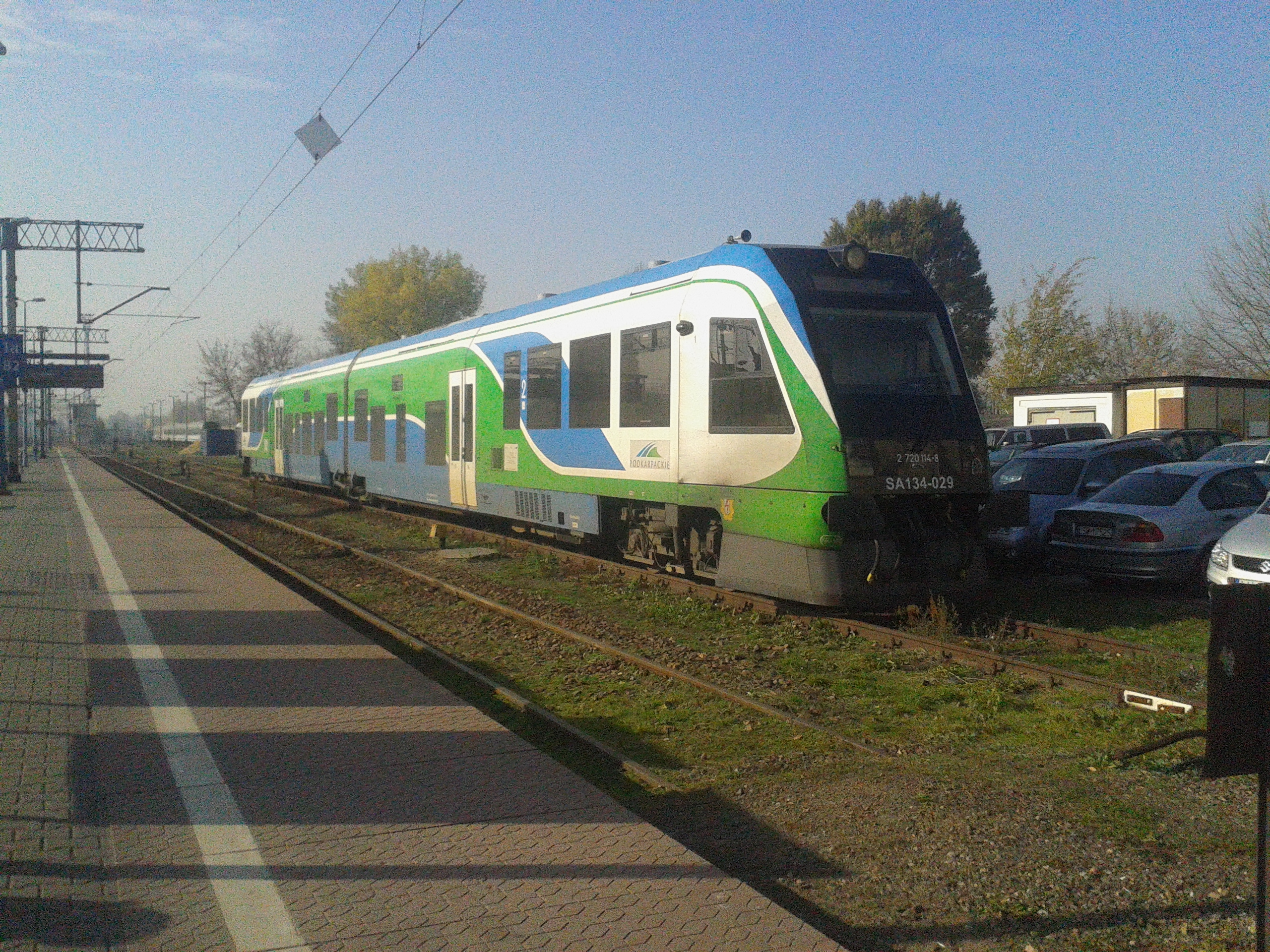 SA134-029 w Lublinie